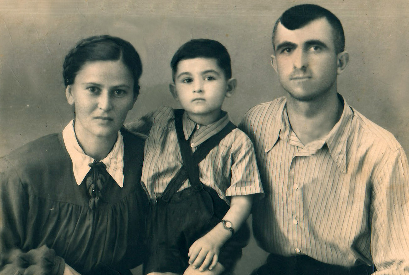 1954 год